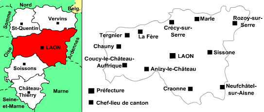 Carte de l'Arrondissement de Laon, dans l'Aisne (02). Image created by Manchot sanguinaire